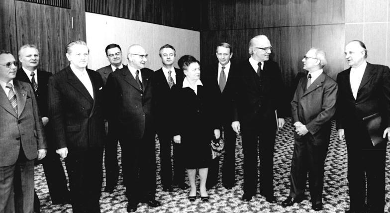 ADN-ZB-Koard 6.3.78 Berlin: Der Generalsekretär des ZK der SED und Vorsitzende des Staatsrates der DDR, Erich Honecker (2.v.r.), empfing am 6.3.78 den Vorstand der Konferenz der Evangelischen Kirchenleitungen in der DDR. V.l.n.r.: Rudi Bellmann, Hermann Kalb, Siegfried Wahrmann, Heinz Eichler, Paul Verner, Manfred Stolpe, Christine Schultheiss Christina Schultheiß, Kurt Dömsch Kurt Domsch, Dr. Albrecht Schönherr und Dr. Dr. Werner Krusche. (Protokoll, Titel und Funktionen siehe ADN-Meldung!)